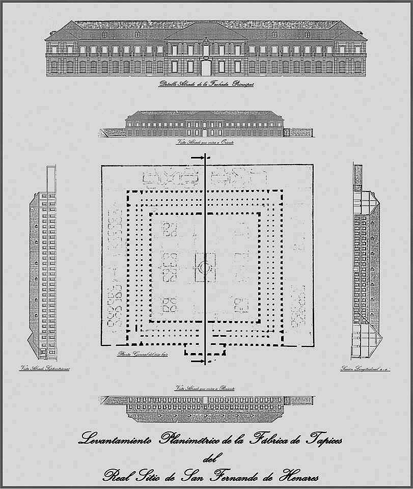 Plano formado a partir del proyecto de reconstrucción de la Real Fábrica de Paños redactado por Luis Cervera Vera en 1947, por el delineante Luis Ángel Zas vecino de San Fernando de Henares.